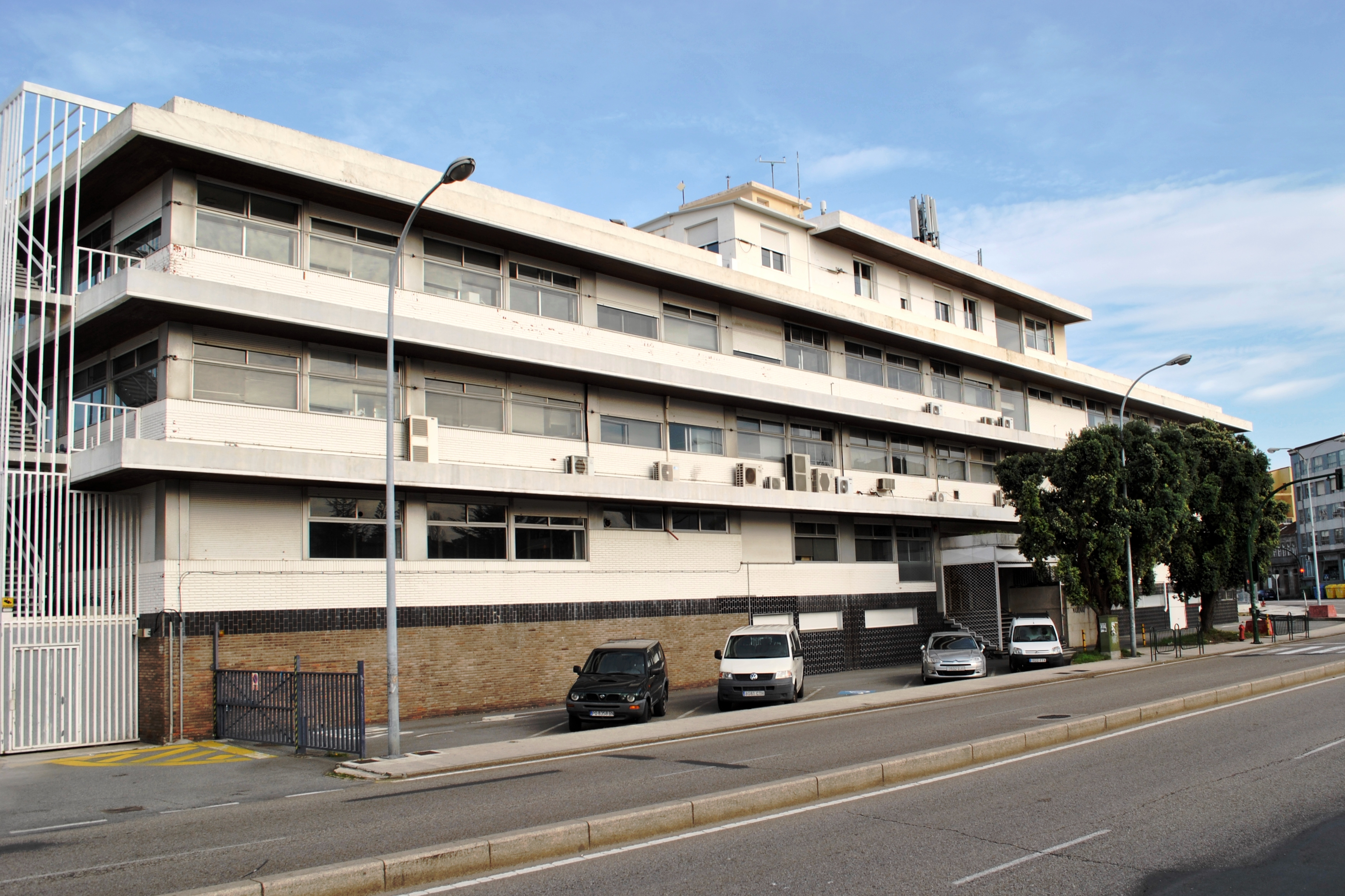 Véxase o título e as categorías.